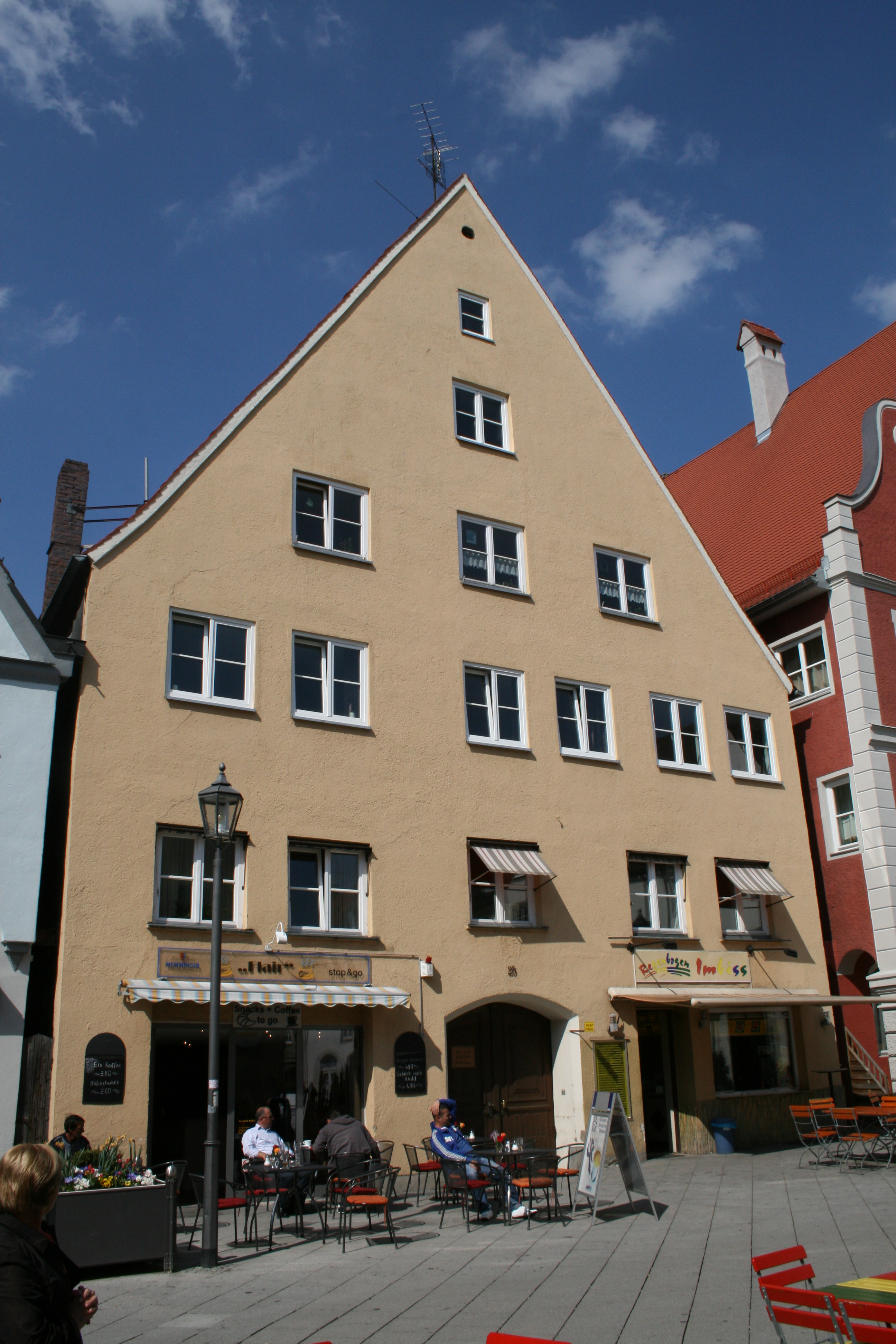 Hausfassade in der Kalchstraße im oberschwäbischen Memmingen